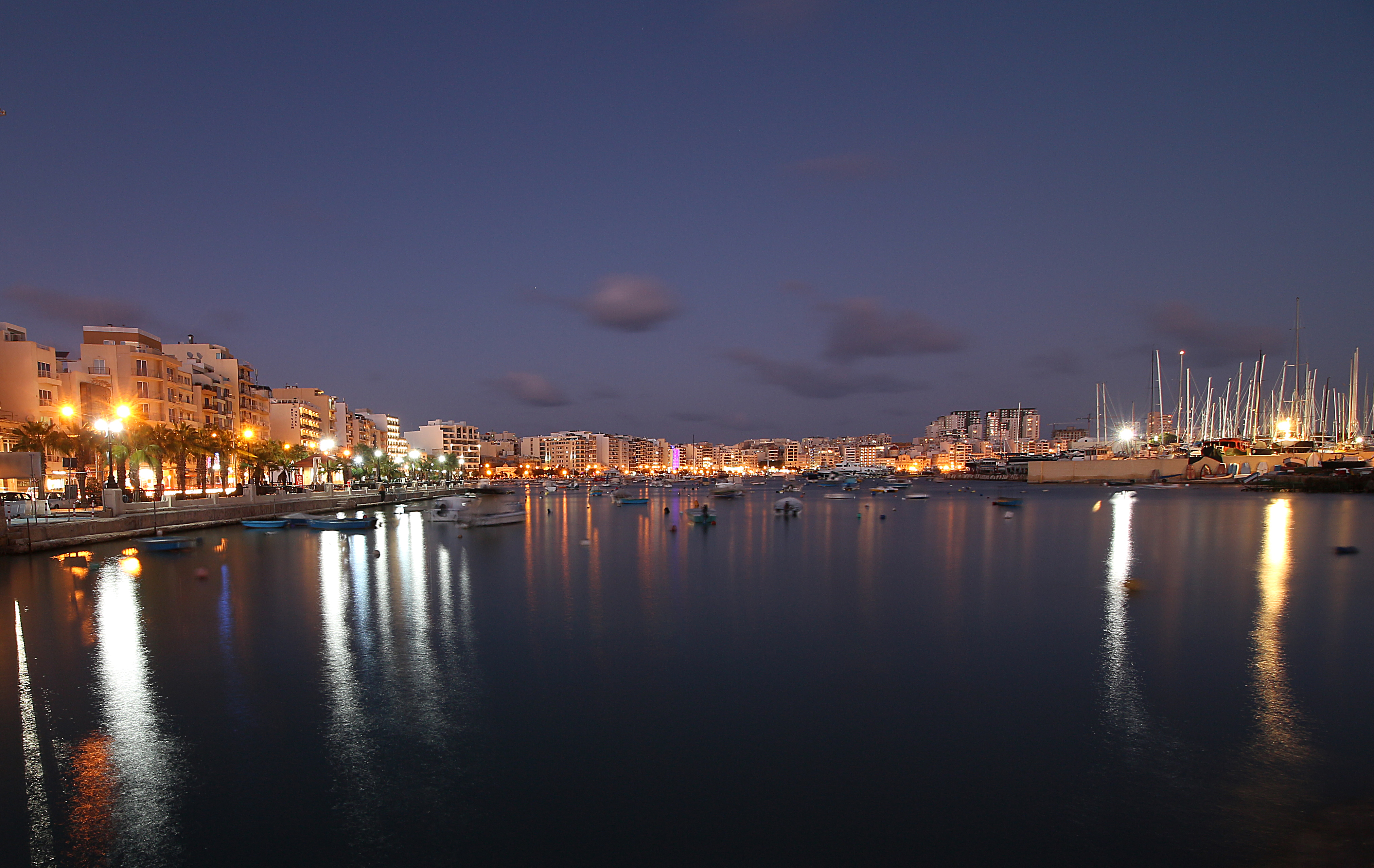 Sliema Creek sett från bron över till Manoel Island.